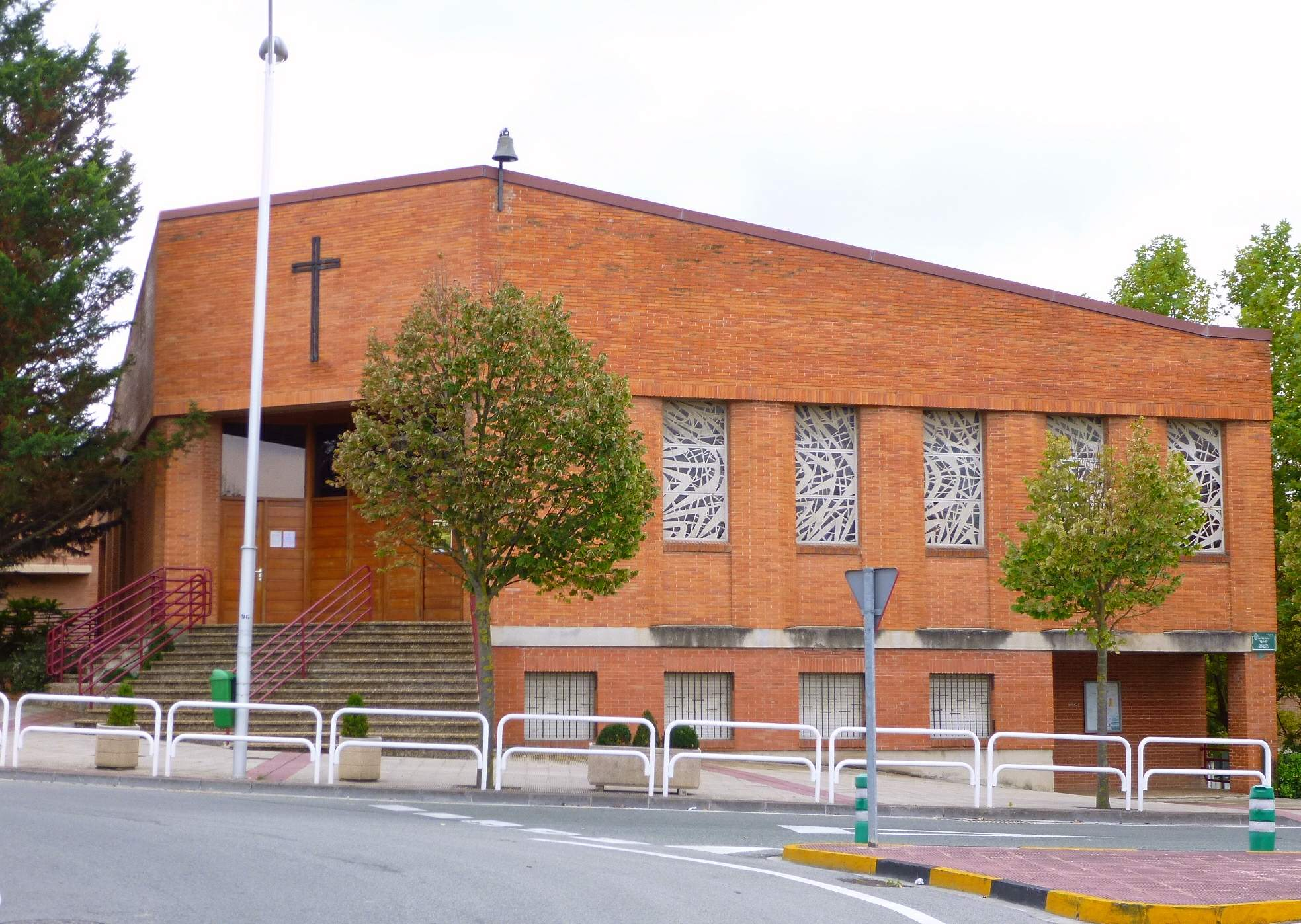 Parroquia de San Miguel (Noáin)